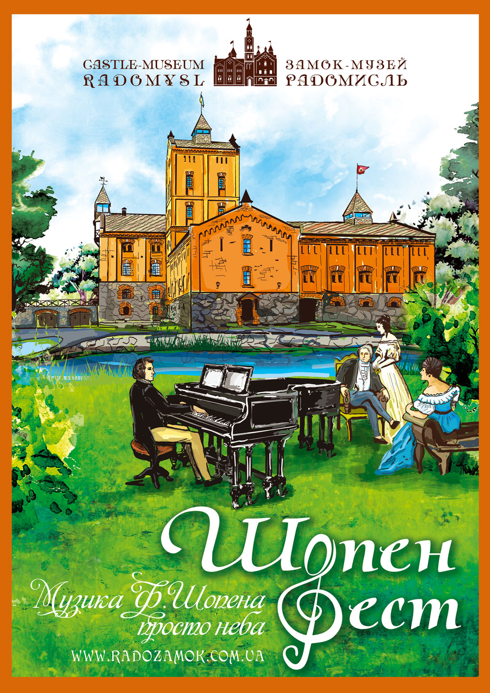 Щорічний Міжнародний фестиваль "Музика Ф.Шопена просто неба"